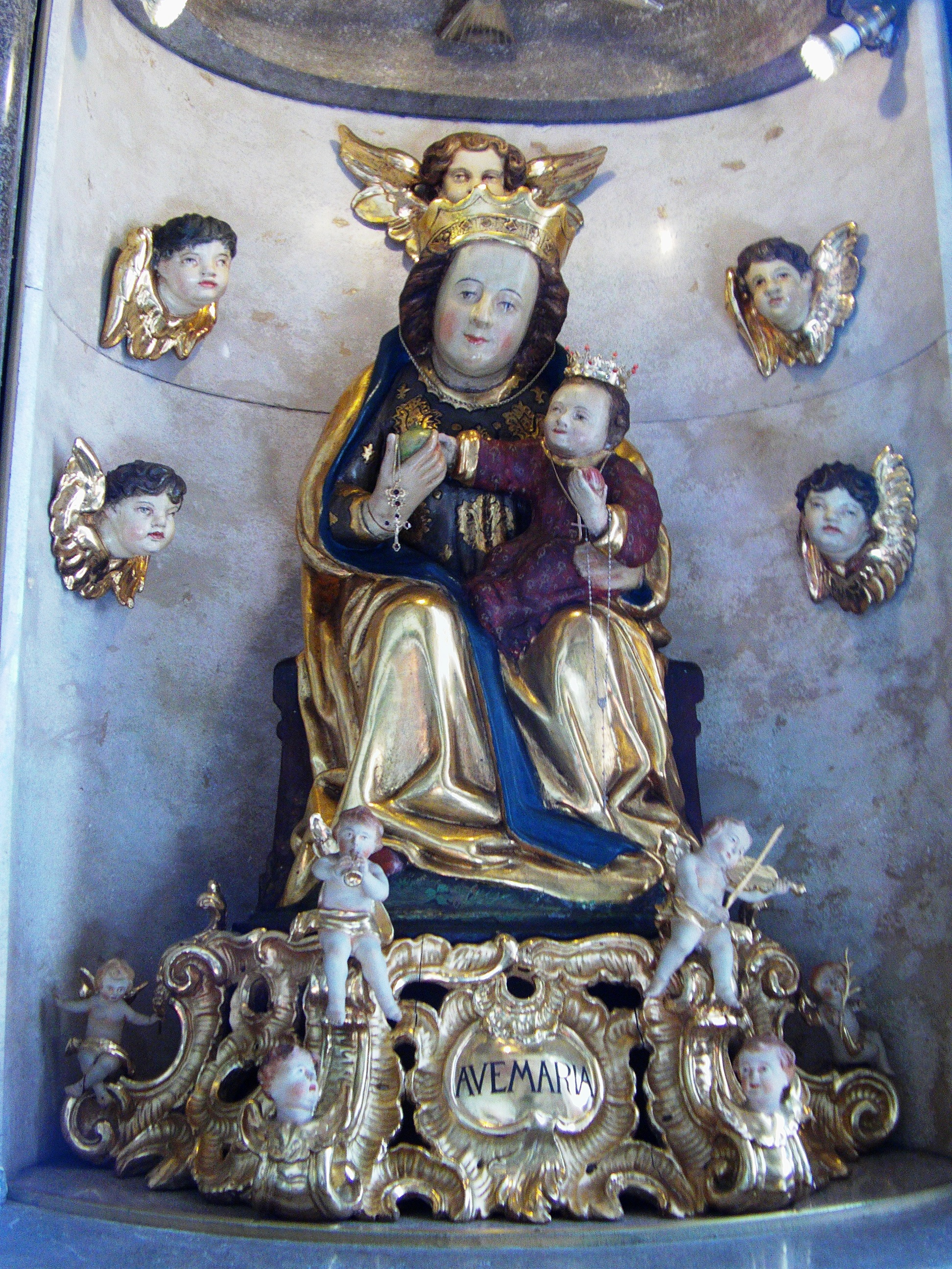 Muttergottes auf dem Holderstock, Marienfigur in der Kapelle in der Wallfahrtskirche in Schneeberg